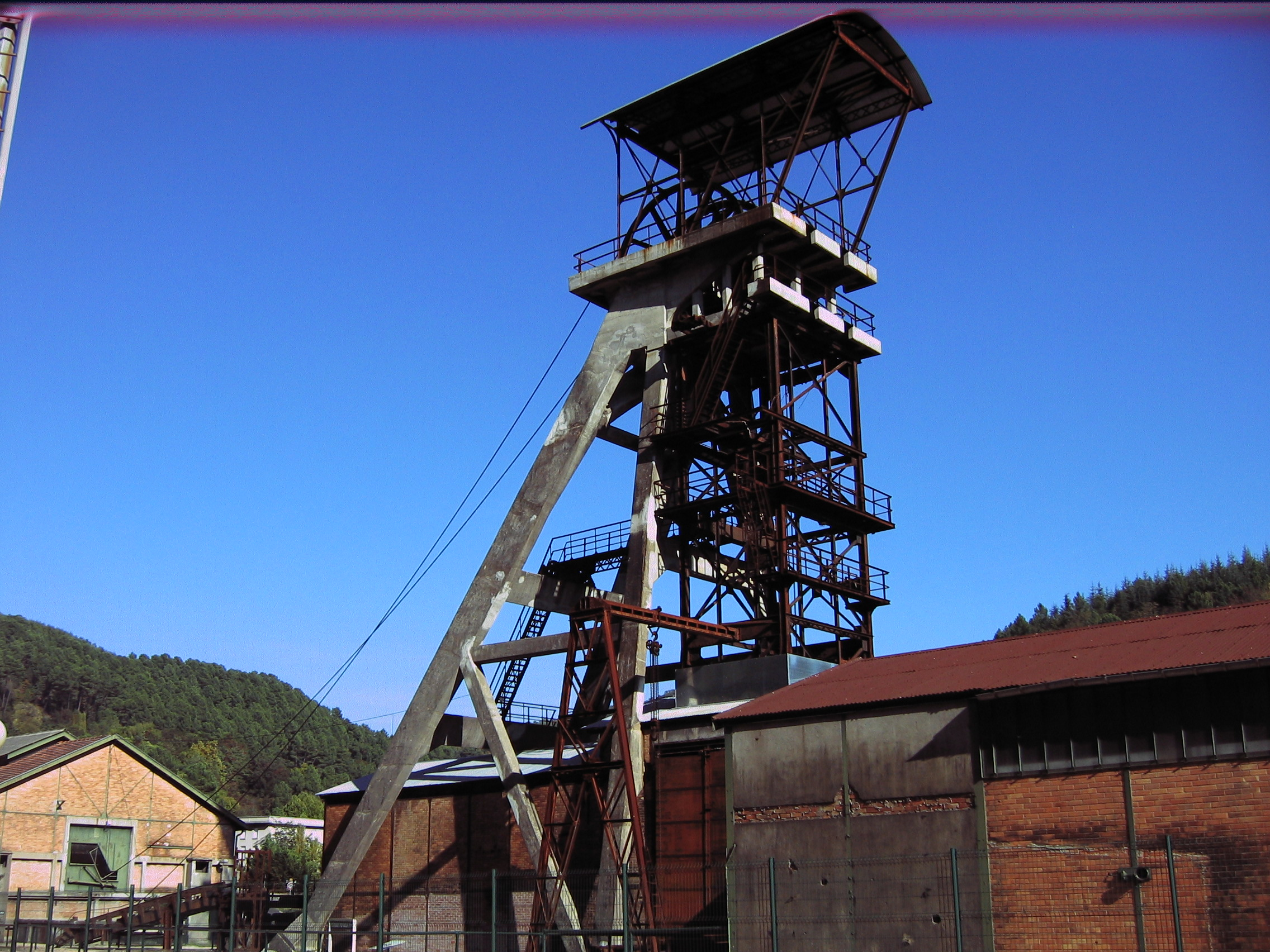 Monument classé, La Grand Combe. Pays Minier.